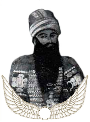 Eu achei essa imagem no artigo em azerbaijano de Maomé Haçane Cã Cajar então eu presumo que a imagem seja dele e possivelmente é de domínio público.